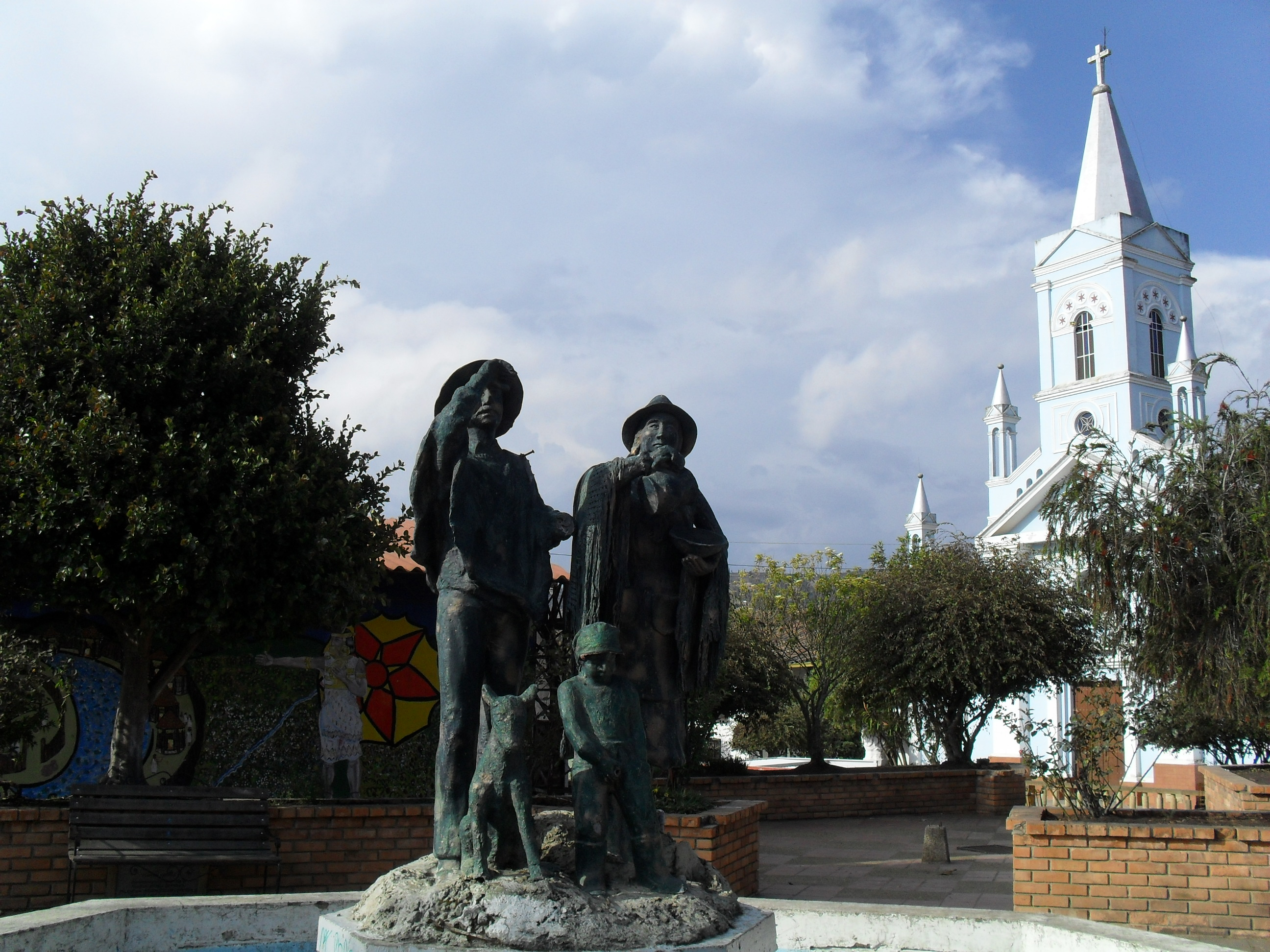 Plaza principal del municipio de Motavita en el departamento de Boyacá, Colombia